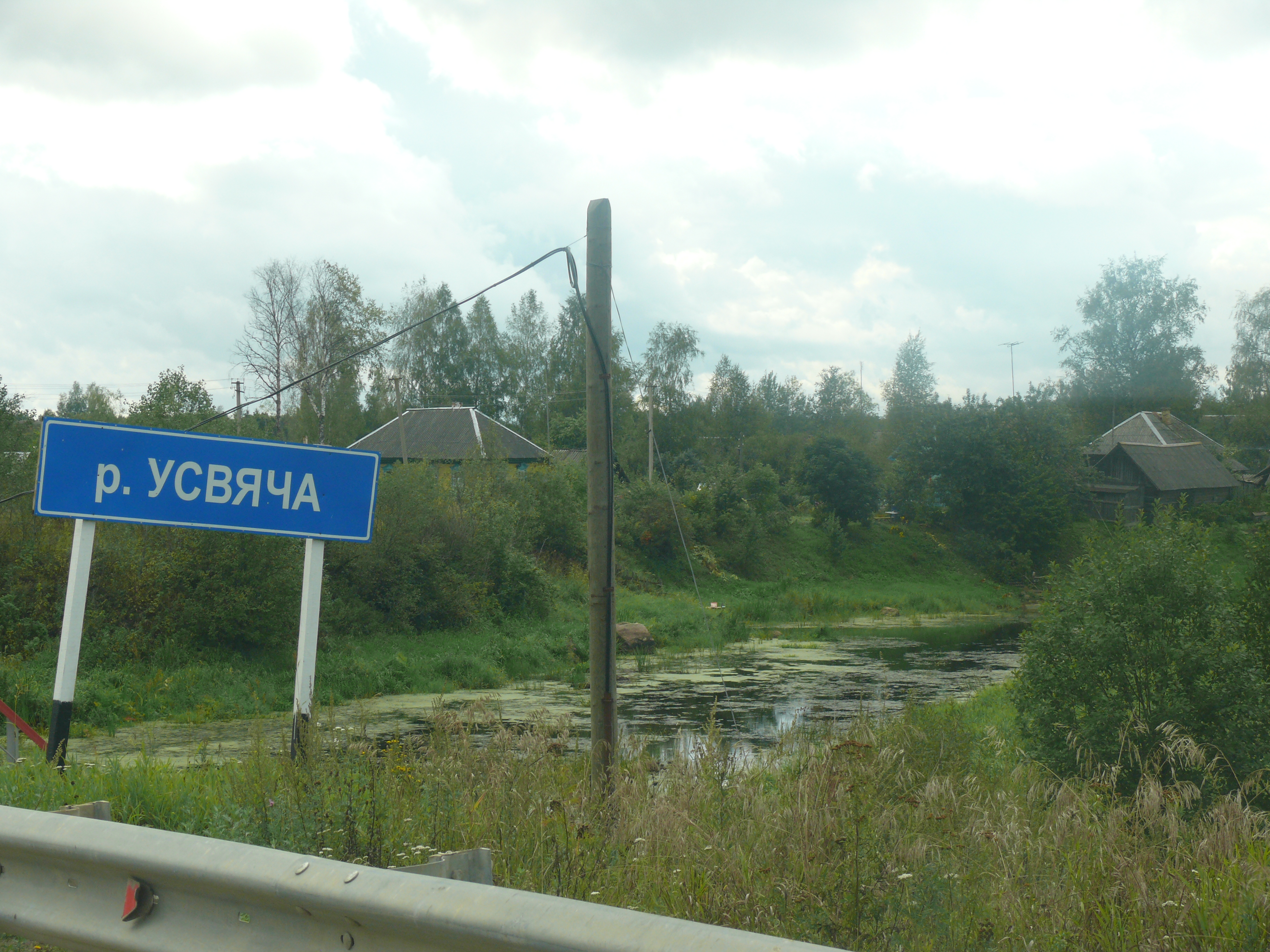 Река Усвяча в Локнянском районе Псковской области